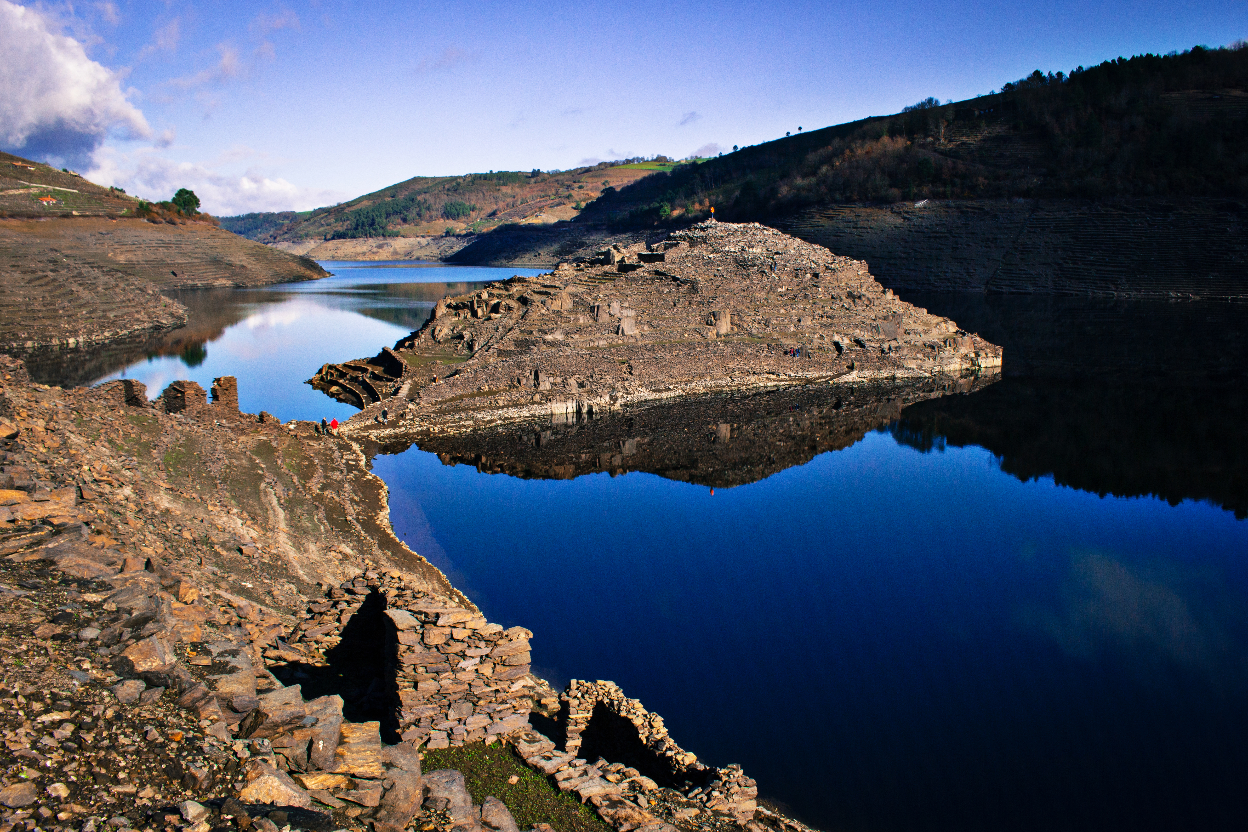 Castro Candaz, no concello lucense de Chantada no medio do río Miño.